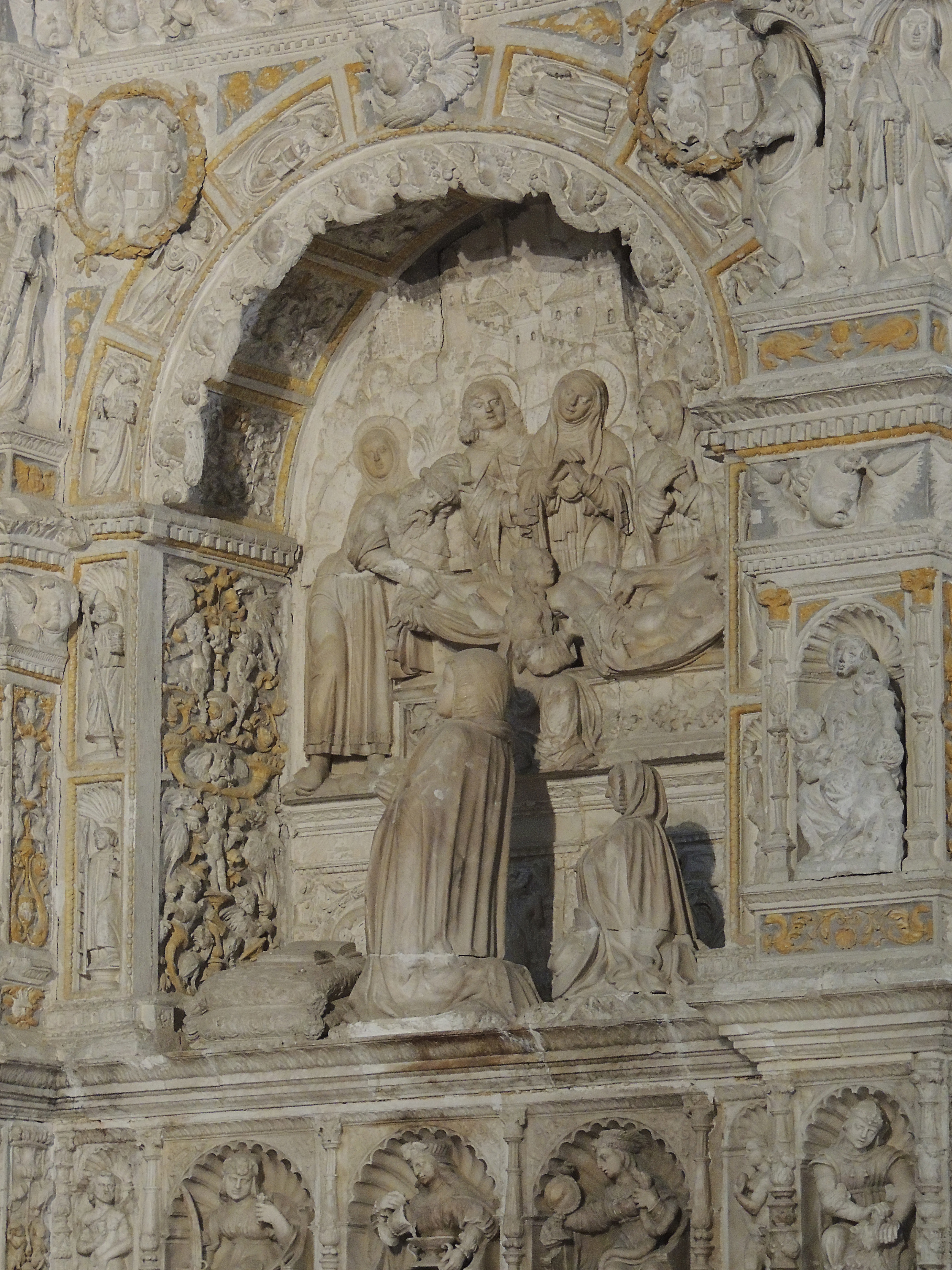 Sepulcro de Maria Portocarrero